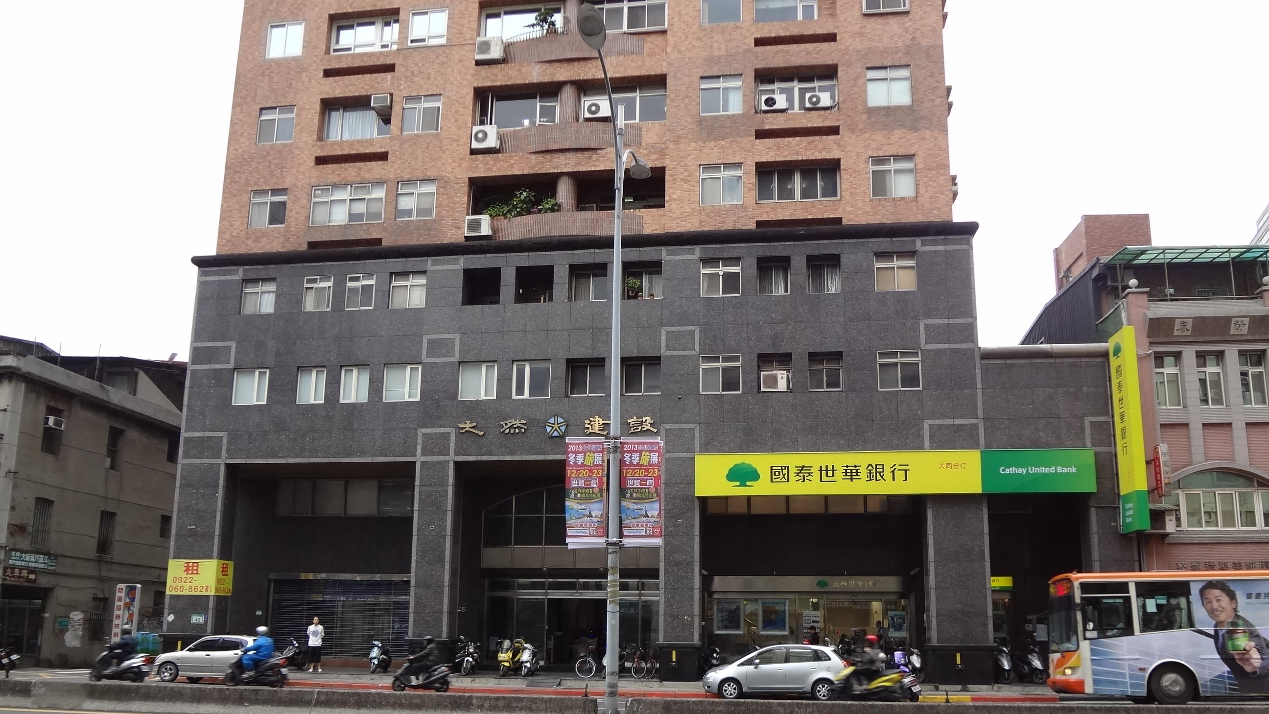 中文（台灣）: 寶鑽大樓，大然建設建造，位於臺北市大同區重慶北路二段48號，大門上方釘掛的大然建設商標與大然文化商標相同。一樓設置國泰世華銀行大同分行。